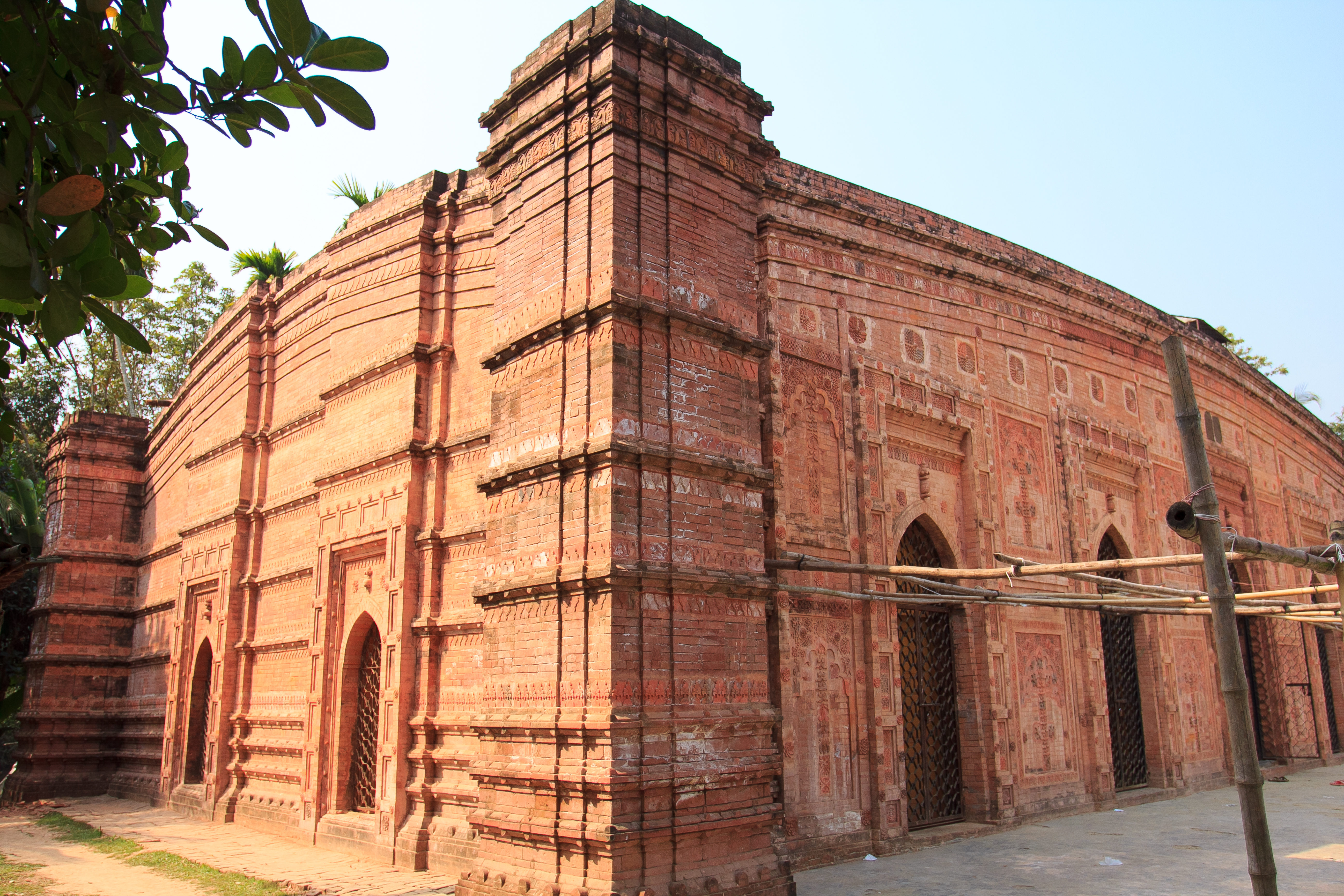 পাতরাইল মসজিদ